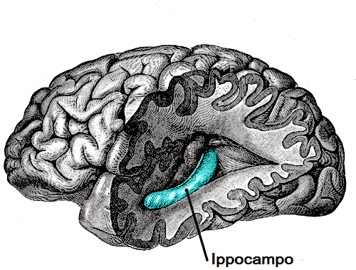 rappresentazione tridimensionale di un cervello umano, con lobo sinistro sezionato per migliore comprensione del posizionamento dell'ippocampo.